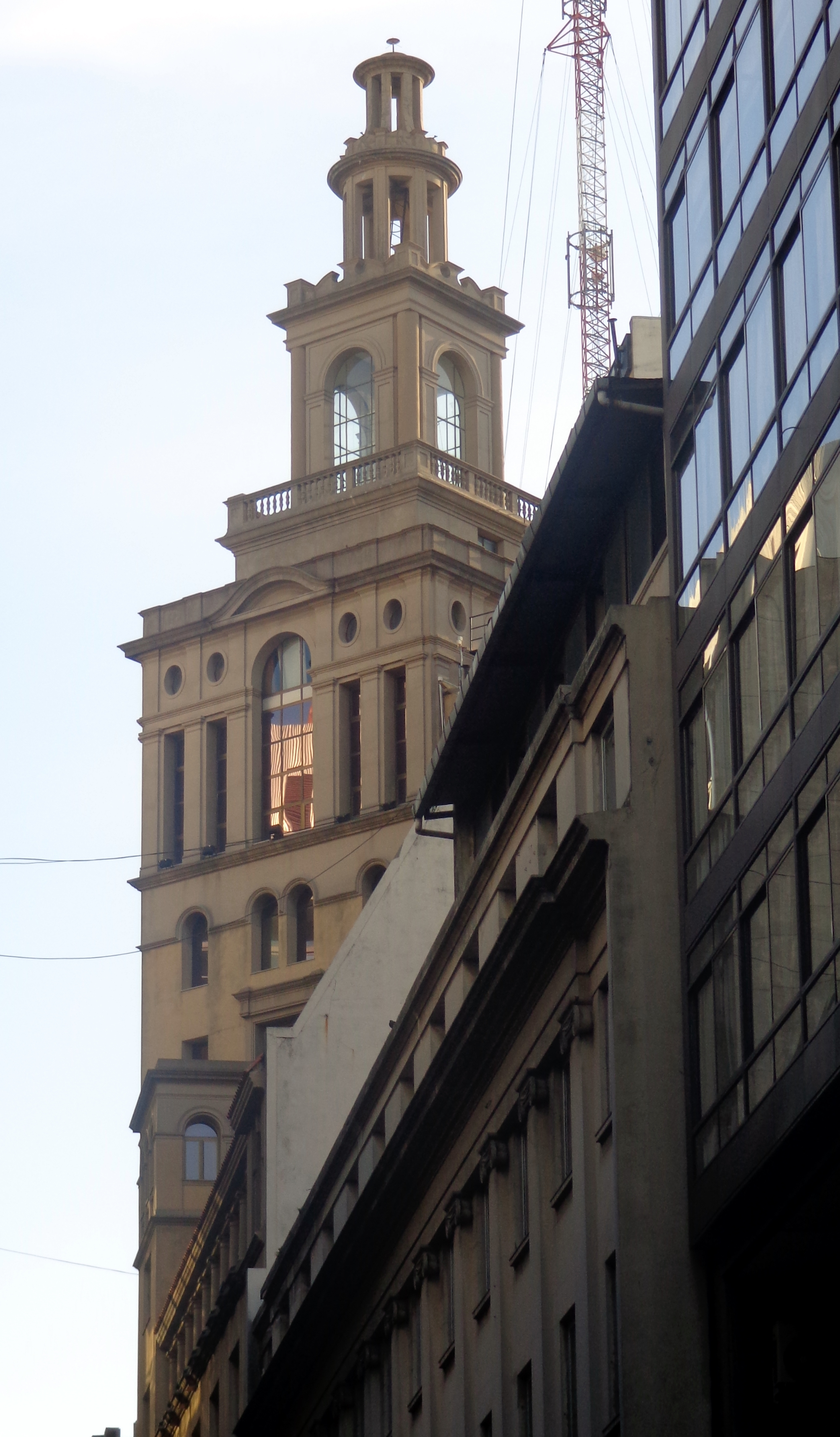 Torre del edificio construido para el Banco Popular Argentino, sede de su Casa Central. Actualmente sucursal del HSBC. Calle Florida 201, esquina Tte. Gral. Juan D. Perón.